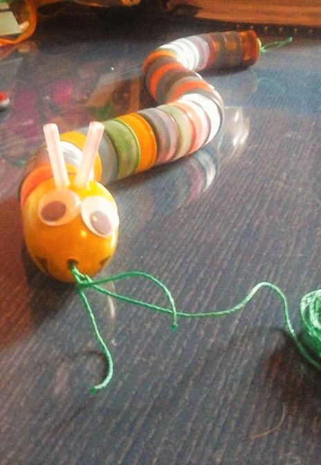 Gusano de arrastre realizado con tapitas de envases descartables unidas con hilo encerado.